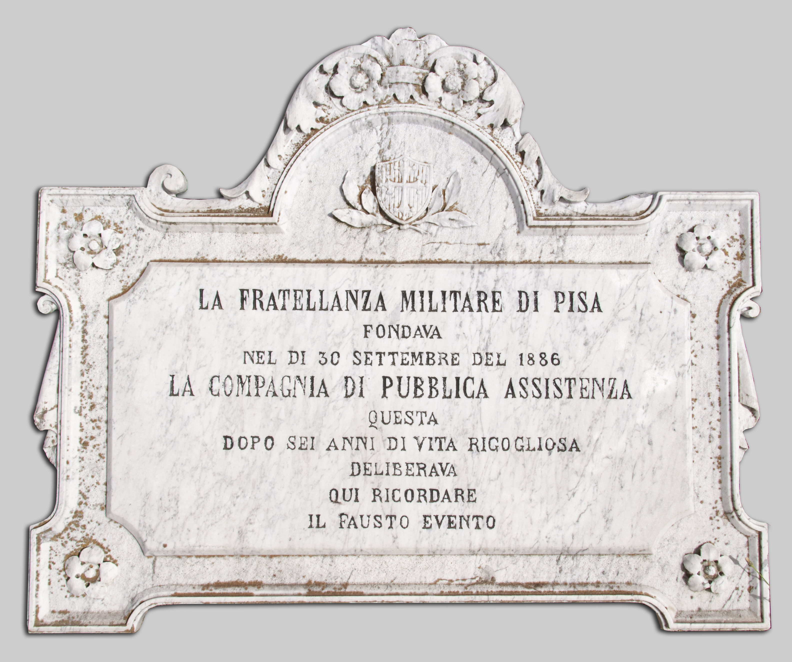 Lapide commemorativa della fondazione dell'Associazione, realizzata a sei anni da quel 30 settembre 1886 che vide la creazione della Pubblica Assistenza Società Riunite Pisa.